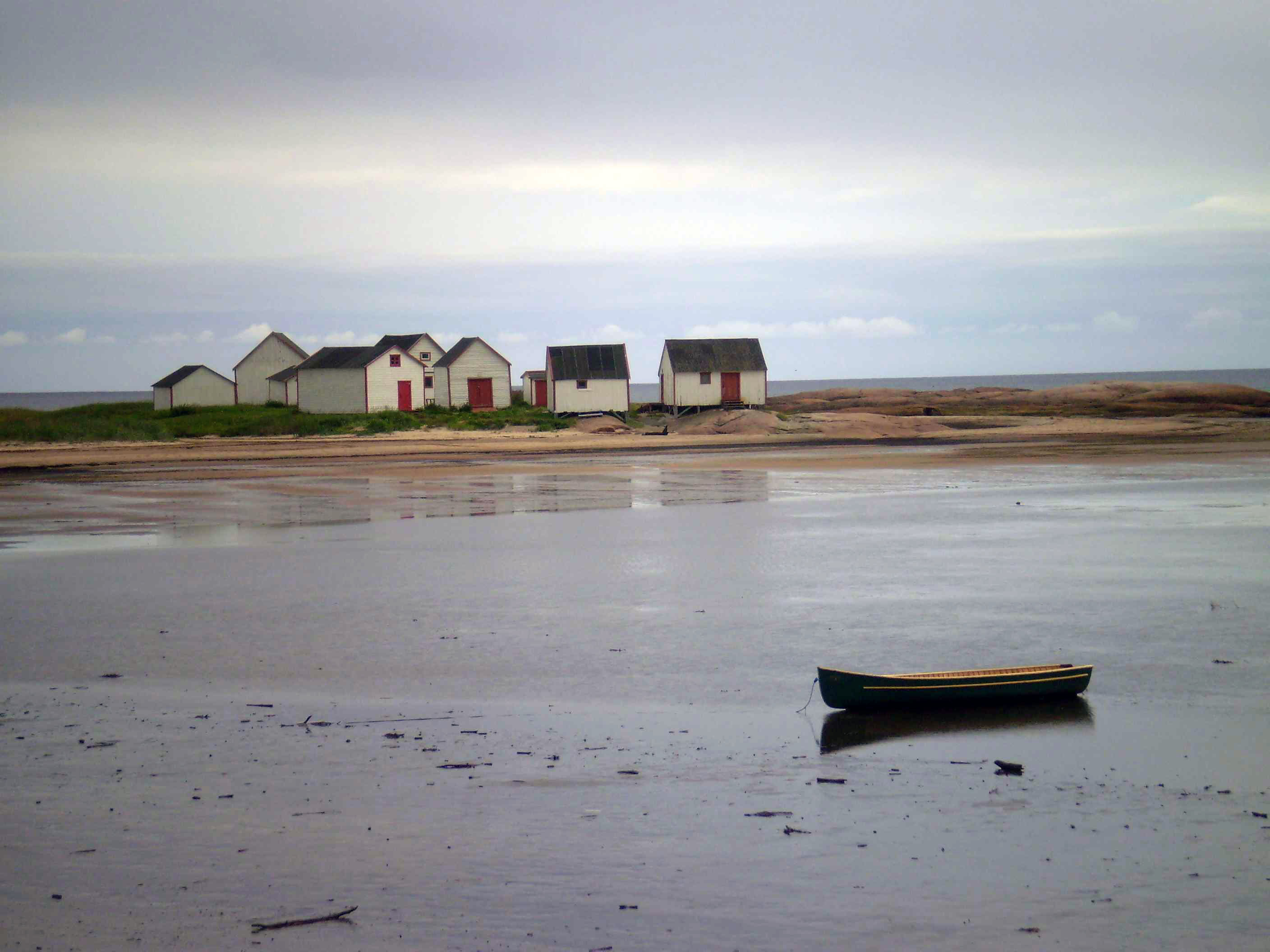 Symbole du village de Natashquan, les magasins du Galet sont d'anciennes cabanes de pêches, vieilles pour certaines de plus de 150 ans. Le site est classé bien culturel du patrimoine québécois depuis 2006.